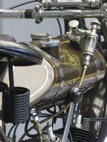 NUT motorcycle lubrification handpump 1923